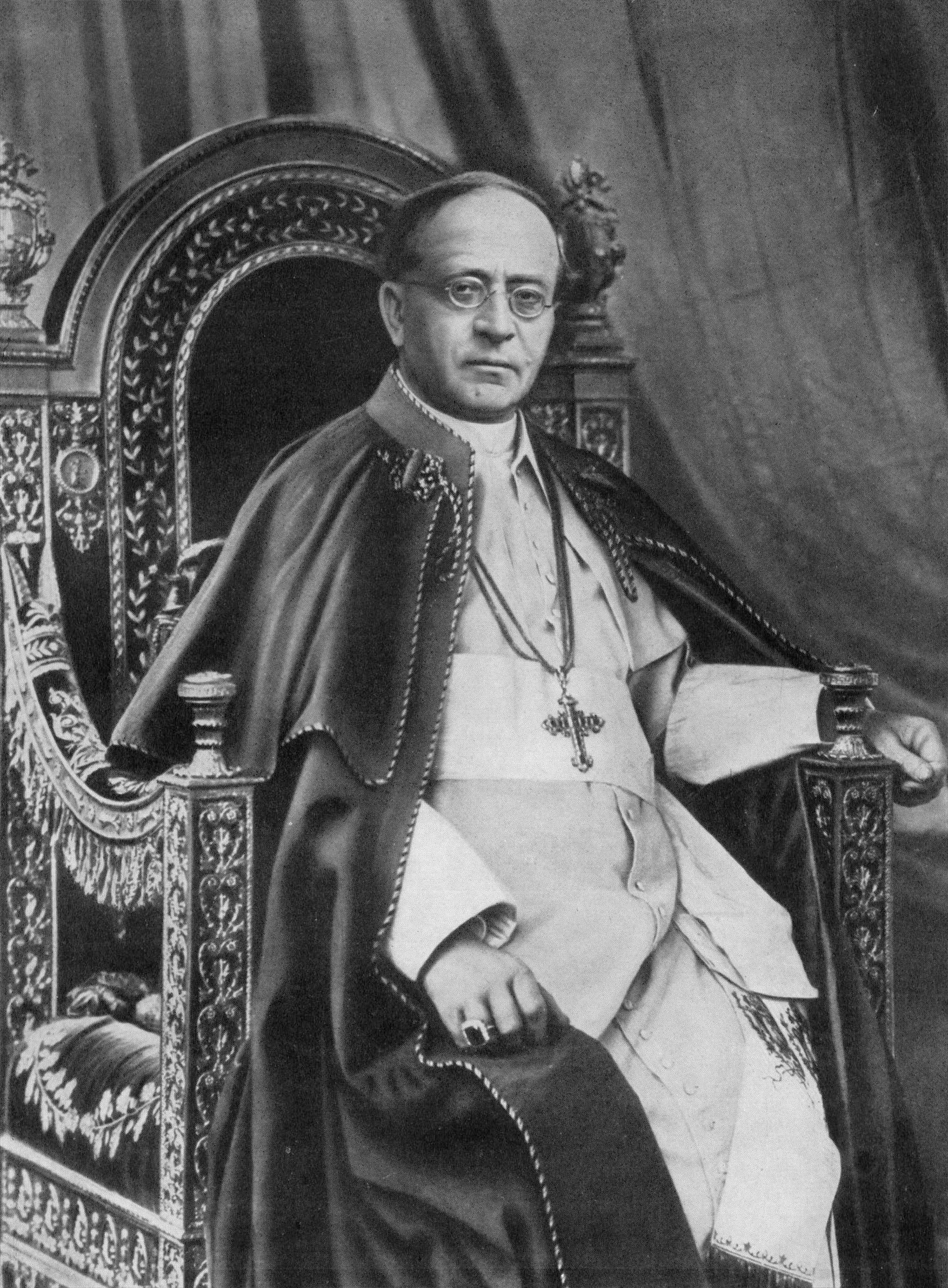 Papst Pius XI.